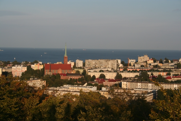 Widok na Wzgórze św. Maksymiliana z platformy widokowej na Witominie